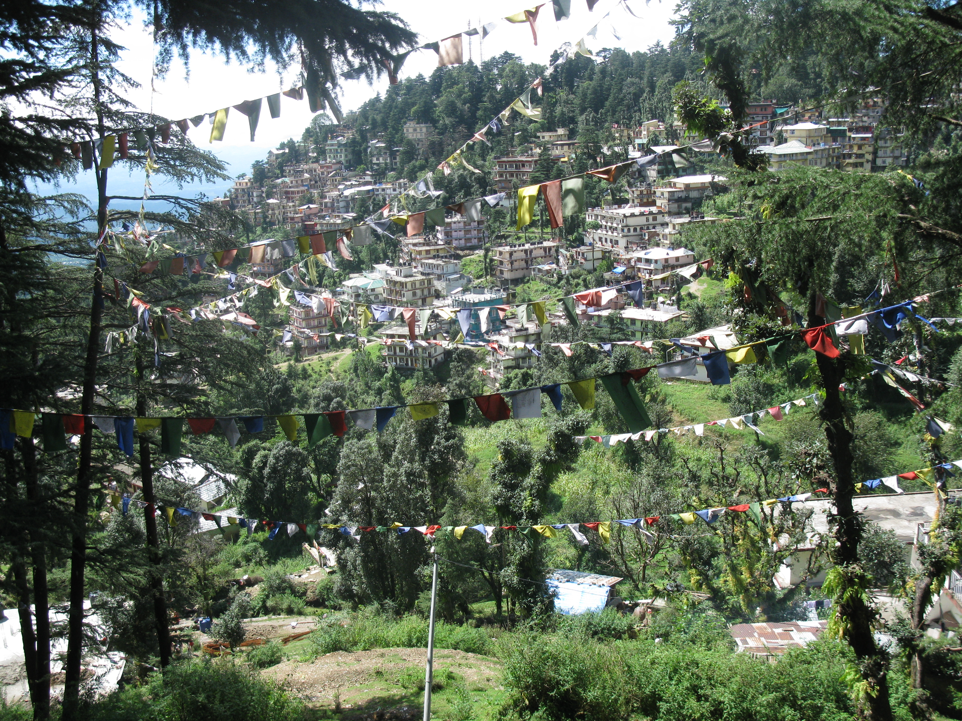 Dharamsala India